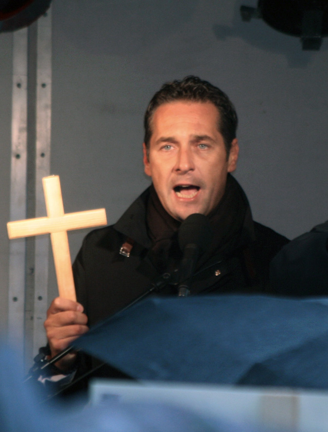 Heinz-Christian Strache (FPÖ) während einer Demonstration gegen den Ausbau eines islamischen Kulturzentrums in Wien-Brigittenau (Friedrich Schmidt-Platz).